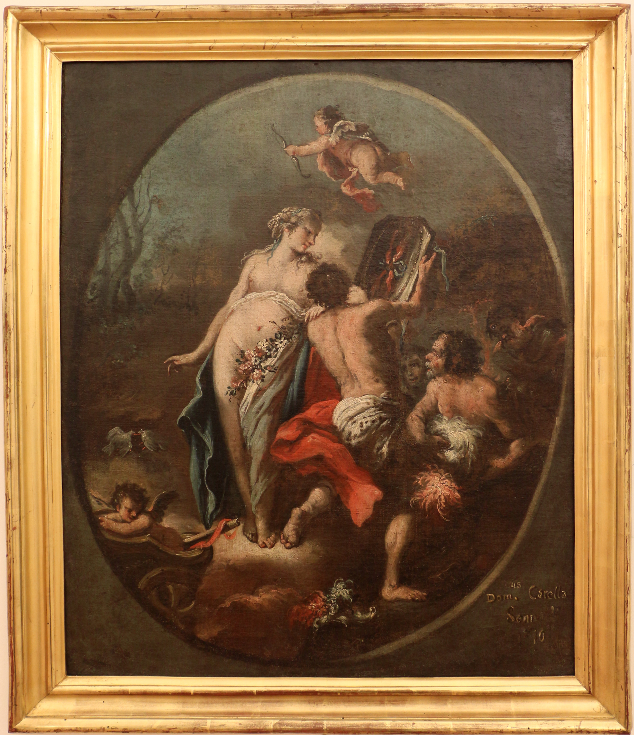 vulcano mostra a venere le folgori forgiatetitle QS:P1476,it:"vulcano mostra a venere le folgori forgiate" label QS:Lit,"vulcano mostra a venere le folgori forgiate"